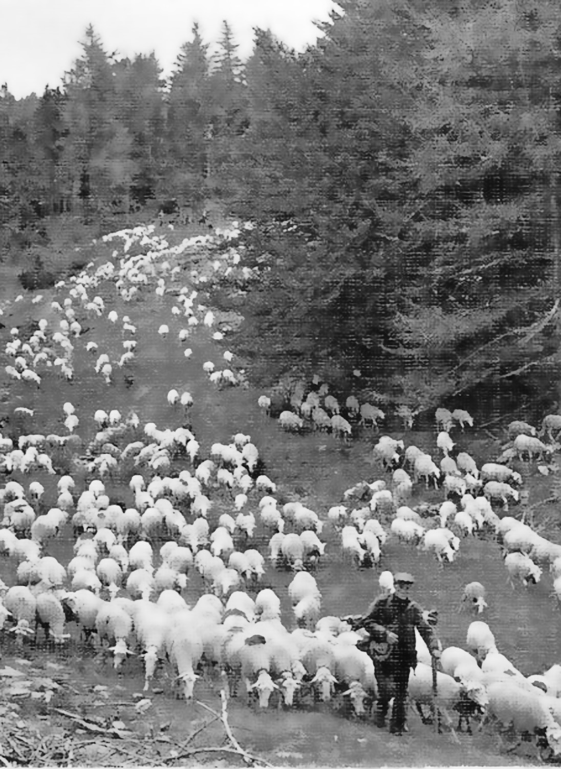 Transhumance vers les alpages de la Rhune